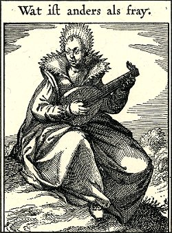 "Wat ist anders als fray", embleem bij een gedicht van Roemer Visscher, aangevuld door zijn dochter Anna, en opgenomen in de bundel "Sinnepoppen" van 1620, een door Anna Visscher verzorgde aangevulde heruitgave van haar vaders bundel uit 1614